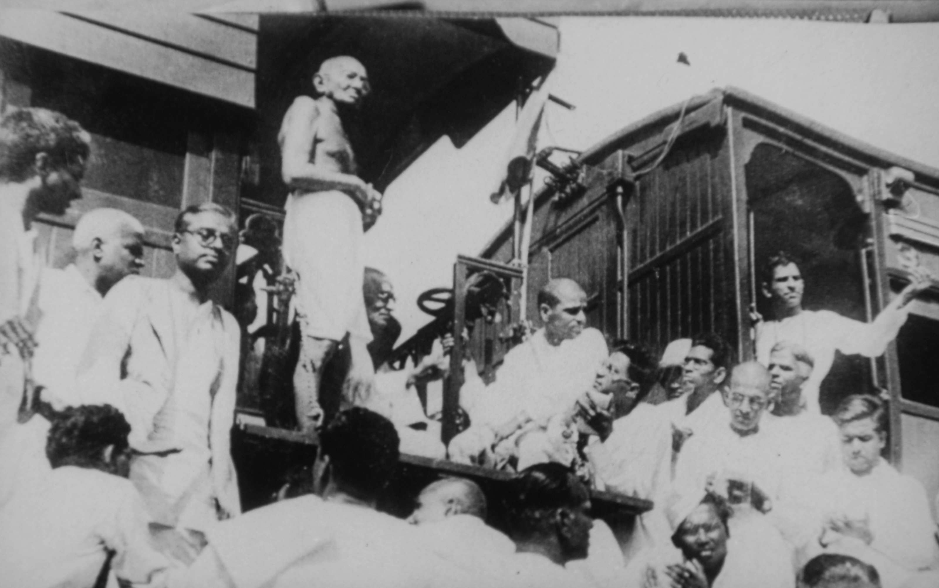 Gandhi, Harijan Work at Madras